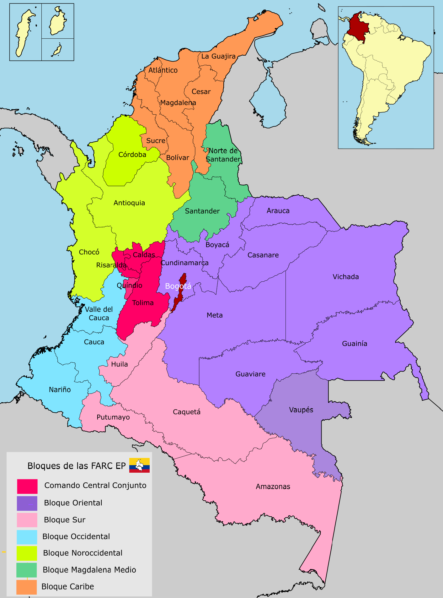 This vector image includes elements that have been taken or adapted from this file: Colombia departamentos otros.svg (by Shadowxfox). This vector image includes elements that have been taken or adapted from this file: Flag of the FARC-EP.svg (by Shadowxfox).